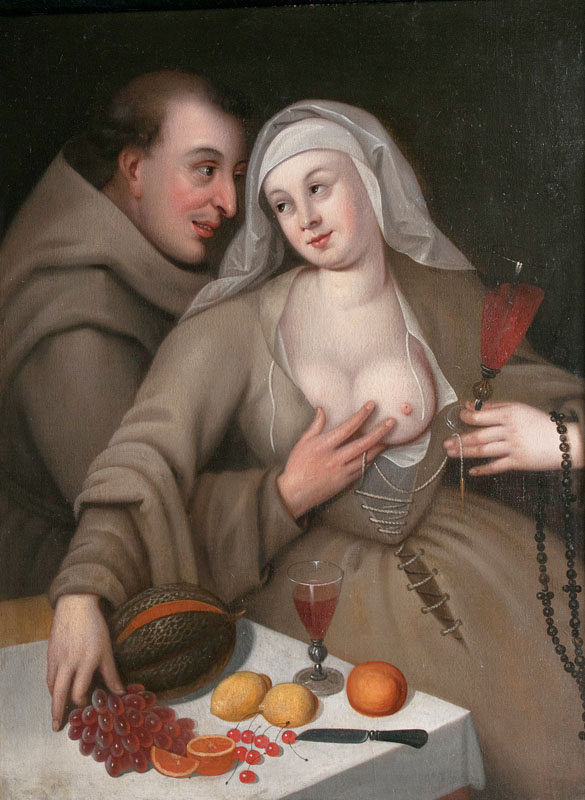 Mönch und Nonne, Öl/Lw., 106 x 83,5 cm, holländischer Meister, tätig um 1700